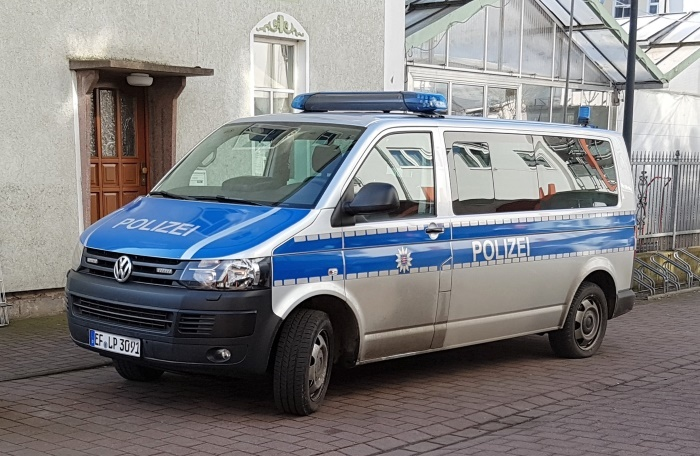 Volkswagen Transporter der Version 5 in Meiningen. Ein Fahrzeug der Thüringer Polizei, beheimatet an der Polizeiinspektion Schmalkalden-Meiningen.